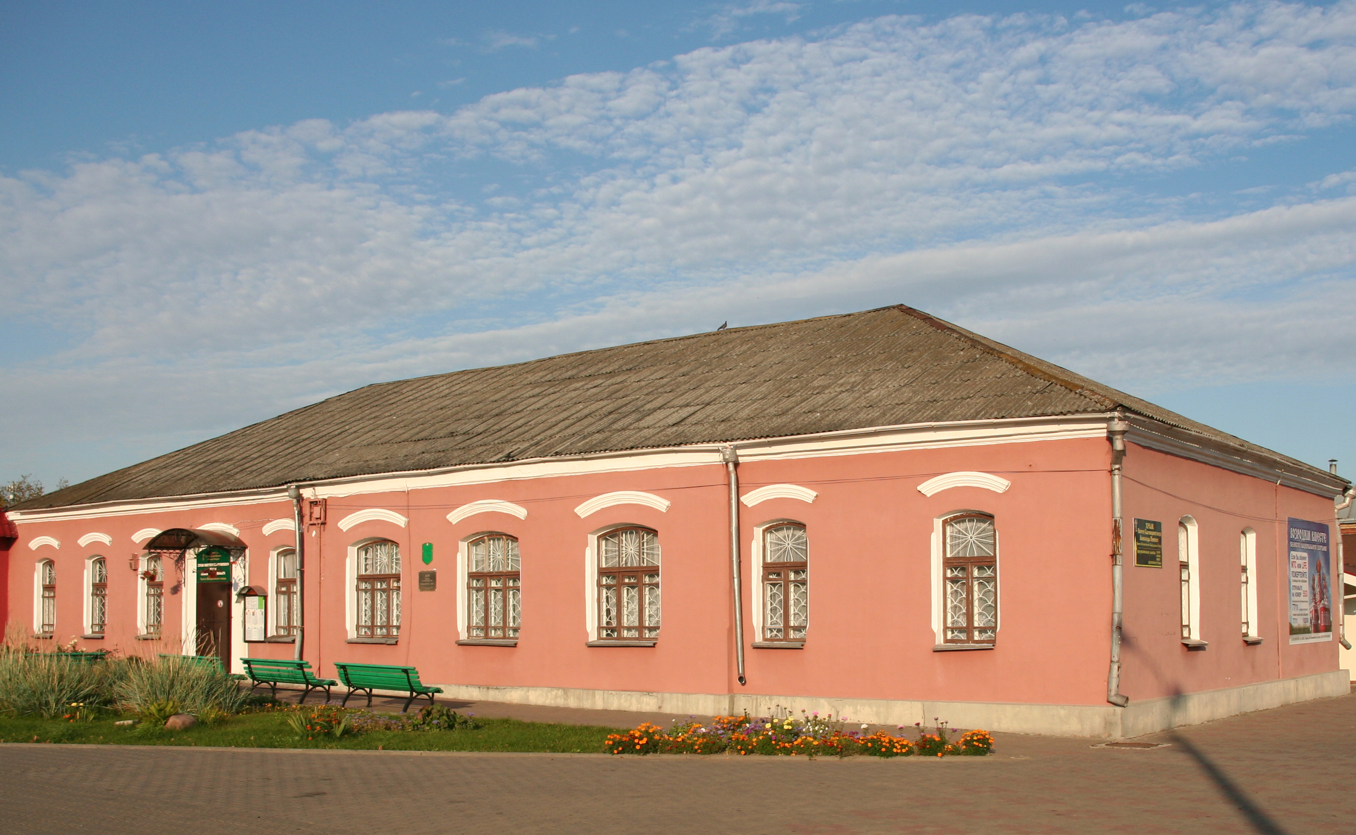 Беларуская (тарашкевіца): Будынак былога казначэйства. г. Барысаў This is a photo of Belarusian heritage monument. Reference number: 613Г000003 ( WLM)